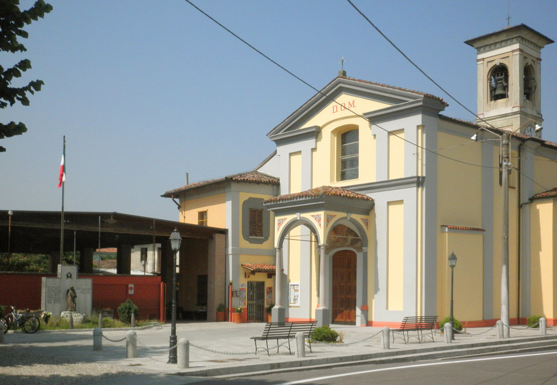 La piazza della chiesa di Basiasco, fraz. di Mairago. La chiesa parrocchiale è dedicata a San Giorgio Martire